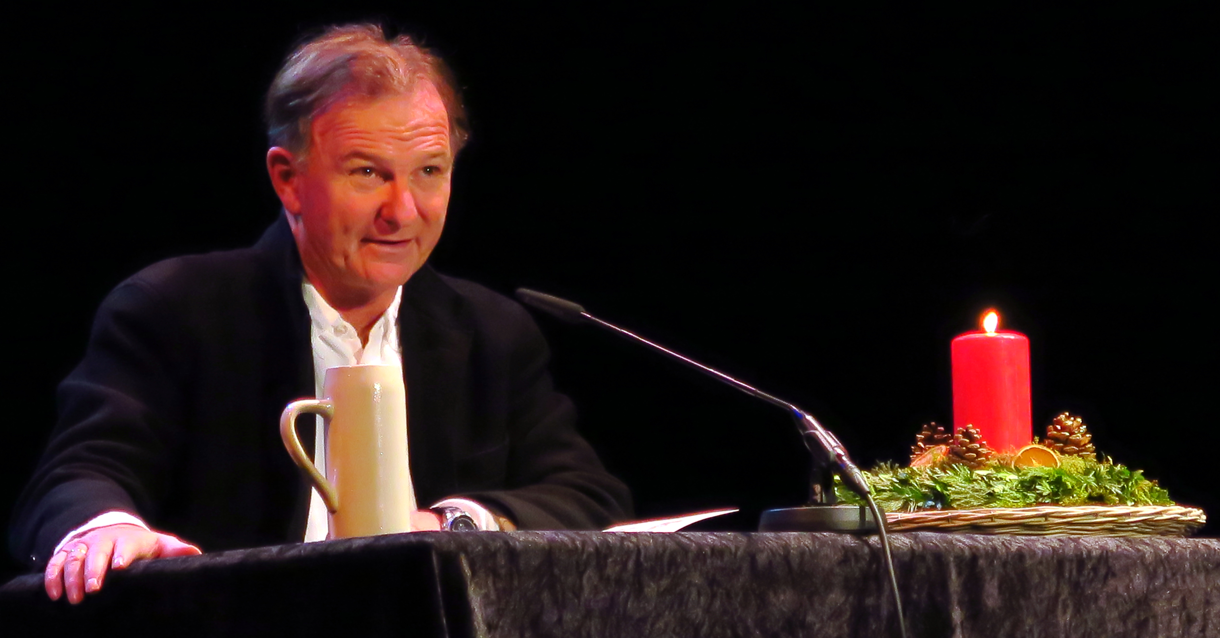 Der bayerische Regisseur, Schauspieler und Autor Michael Lerchenberg liest im Parktheater in Augsburg das Gedicht "Heilige Nacht" von Ludwig Thoma im Dezember 2016